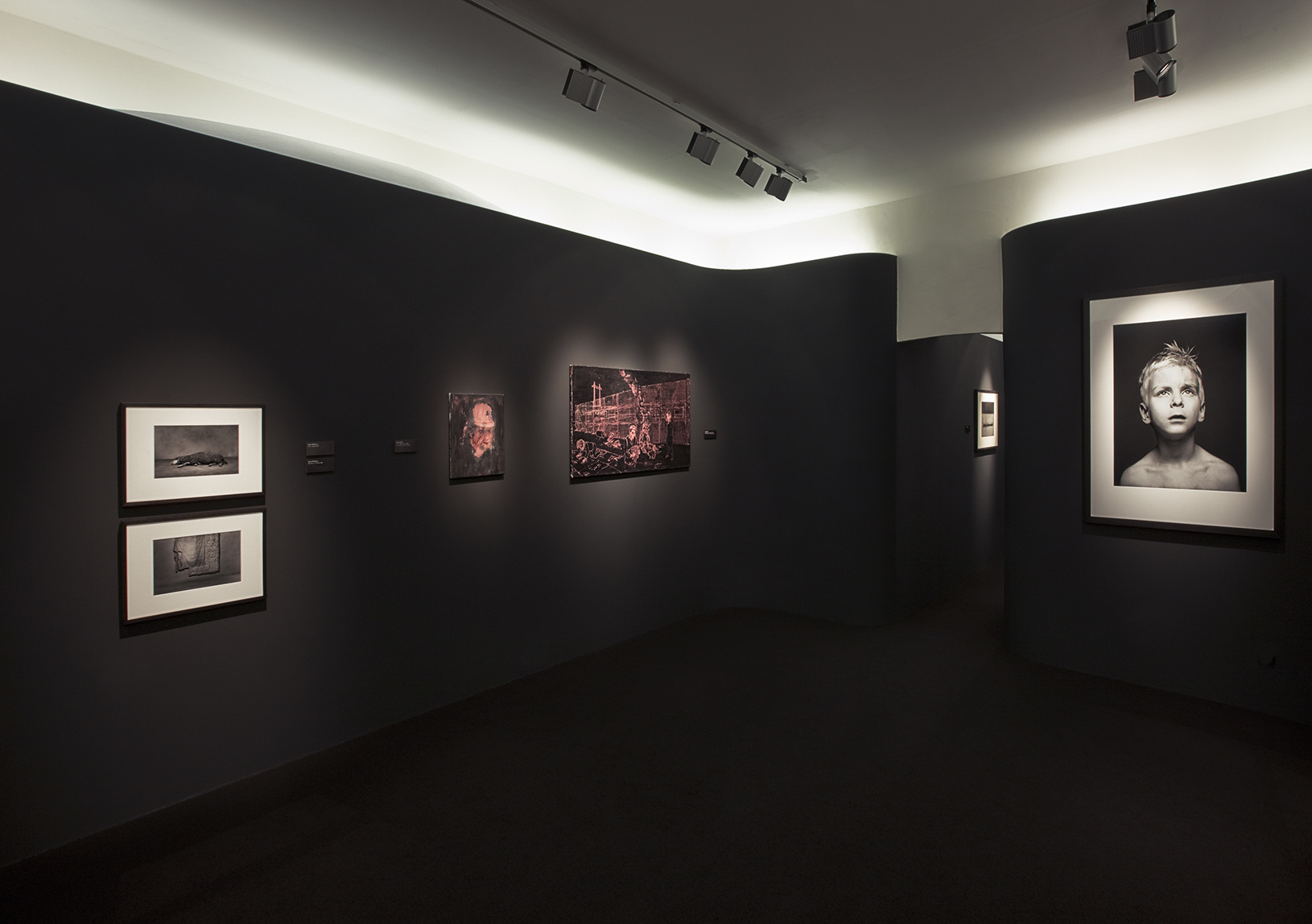 výstava Ivana Pinakvy